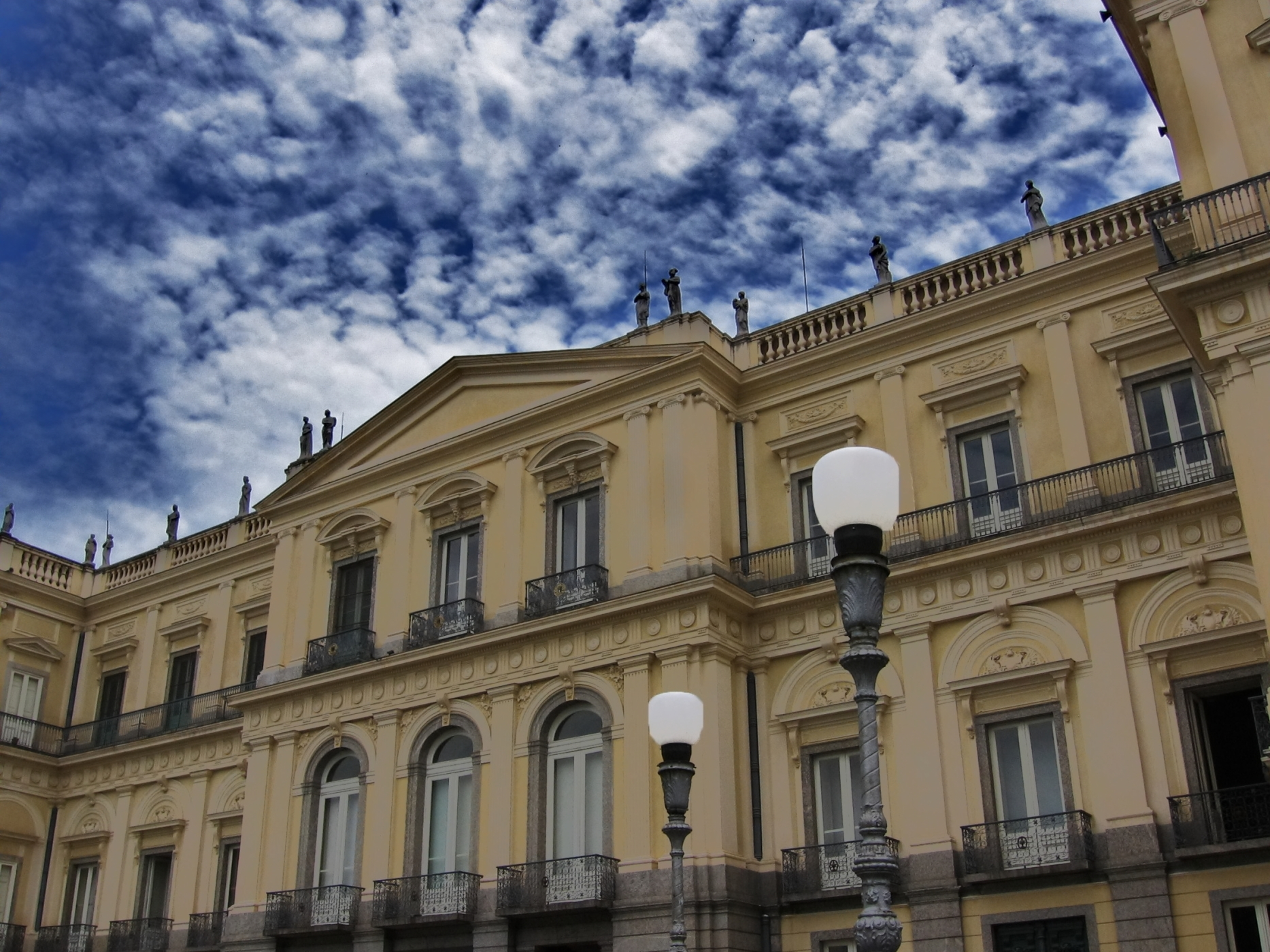 Fachada do Museu da Universidade Federal do Rio de Janeiro